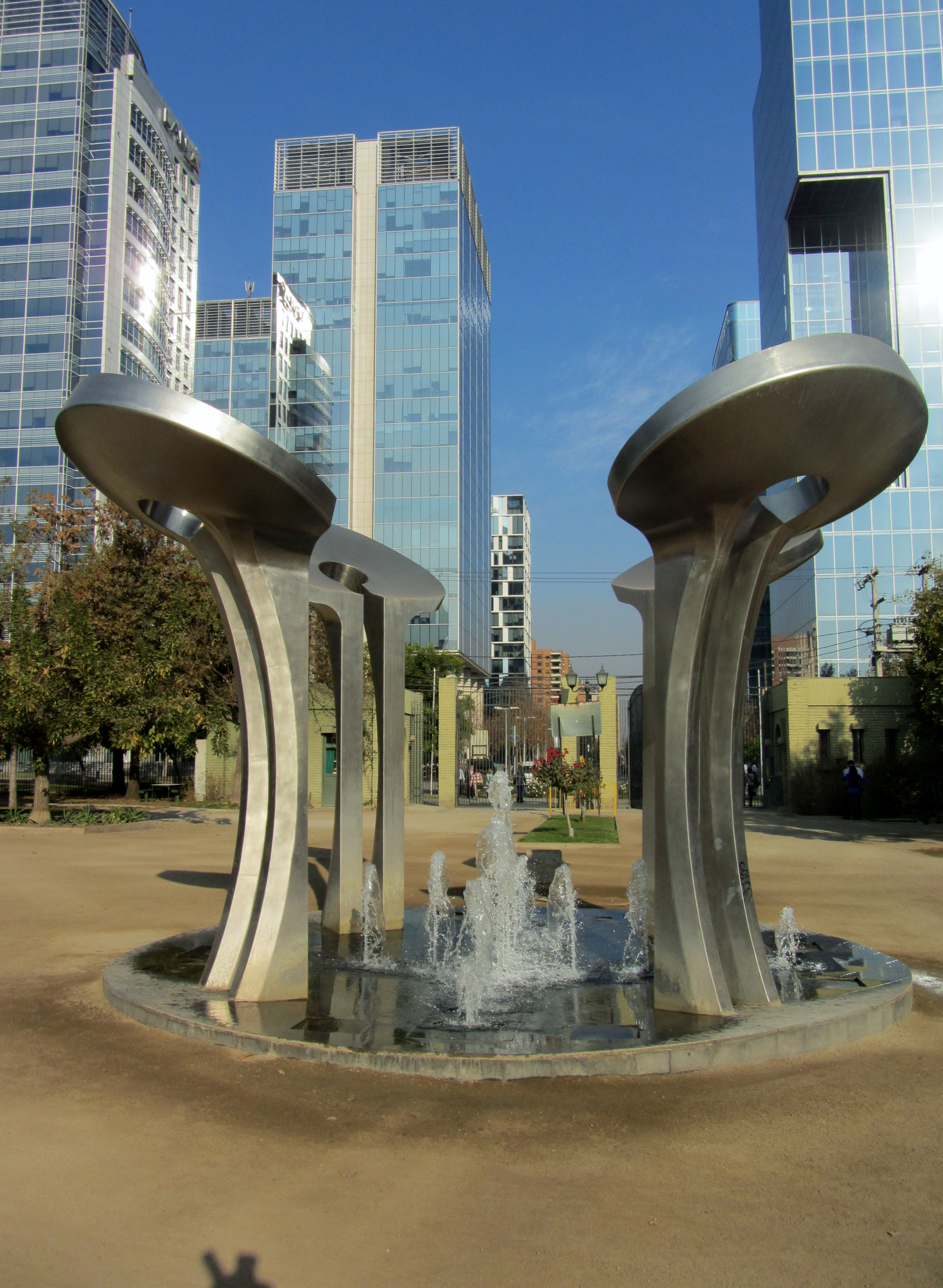 Escultura Ofrenda de María Angélica Echavarri, a la entrada del Parque Araucano, Santiago de Chile. Está formada por 4 estructuras de acero inoxidable de 3 m de alto; una base circular de 5 m de diámetro, revestida en granito negro, compuesta por surtidores de agua que forman una cruz. Fue inaugurada en 2012.